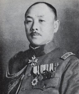 阿南惟几头像